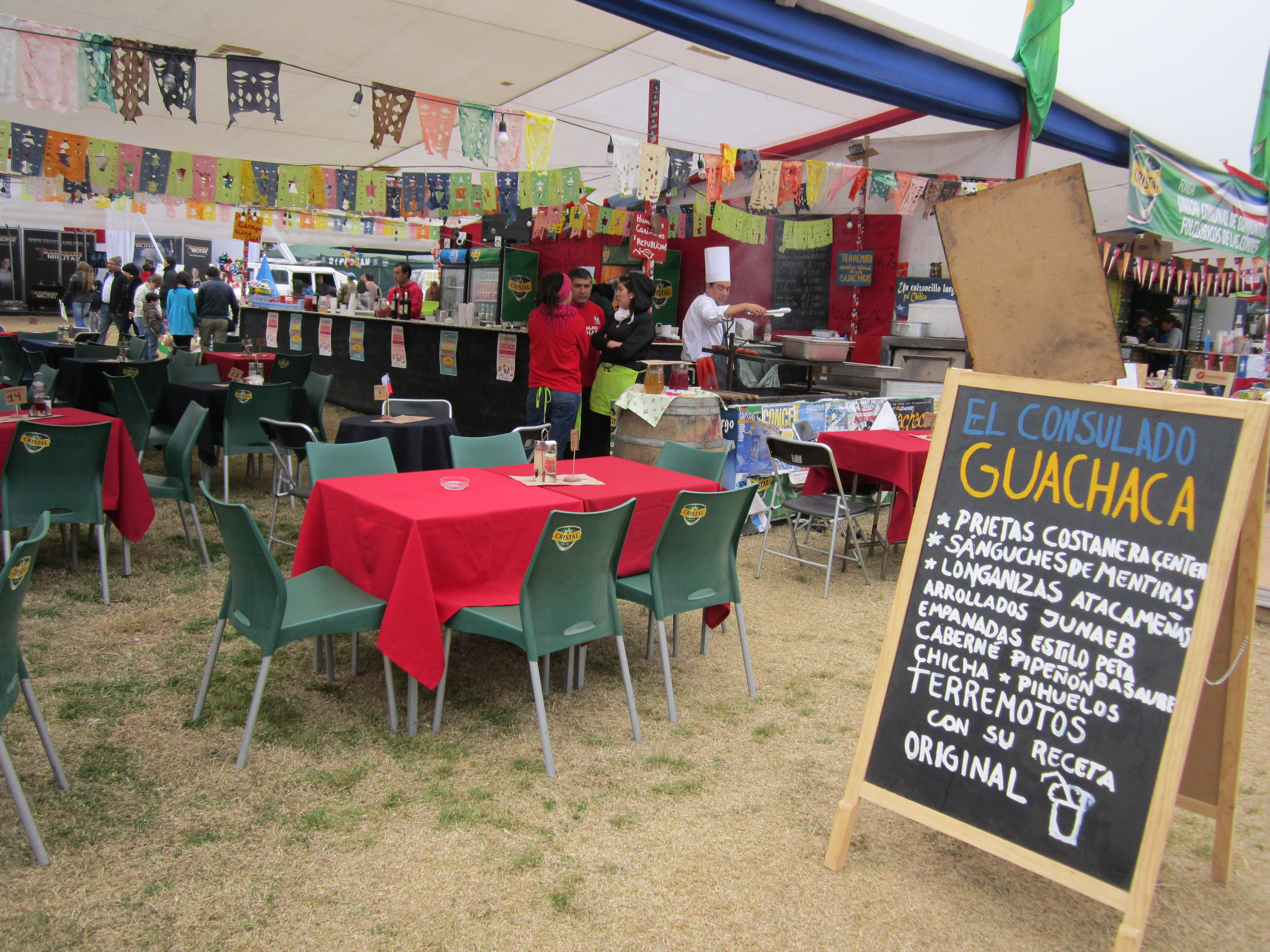 Fonda "guachaca" en el Parque Padre Hurtado, septiembre de 2012.